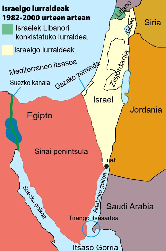 Libanoko gerra (1982-2000)